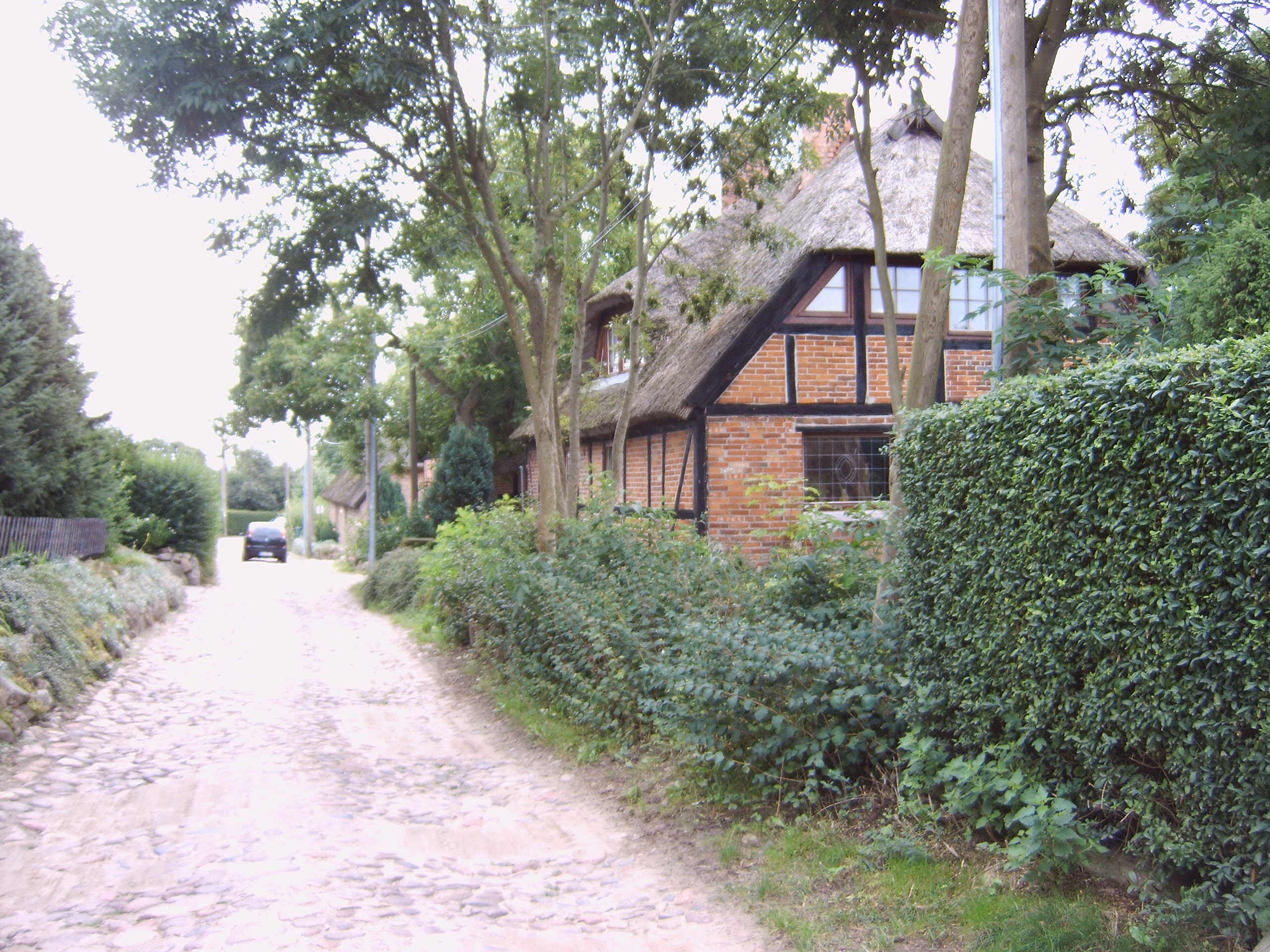 Altensien (Sellin) auf Rügen, Deutschland Bild aufgenommen am 13.8.2006 durch Olaf Meister